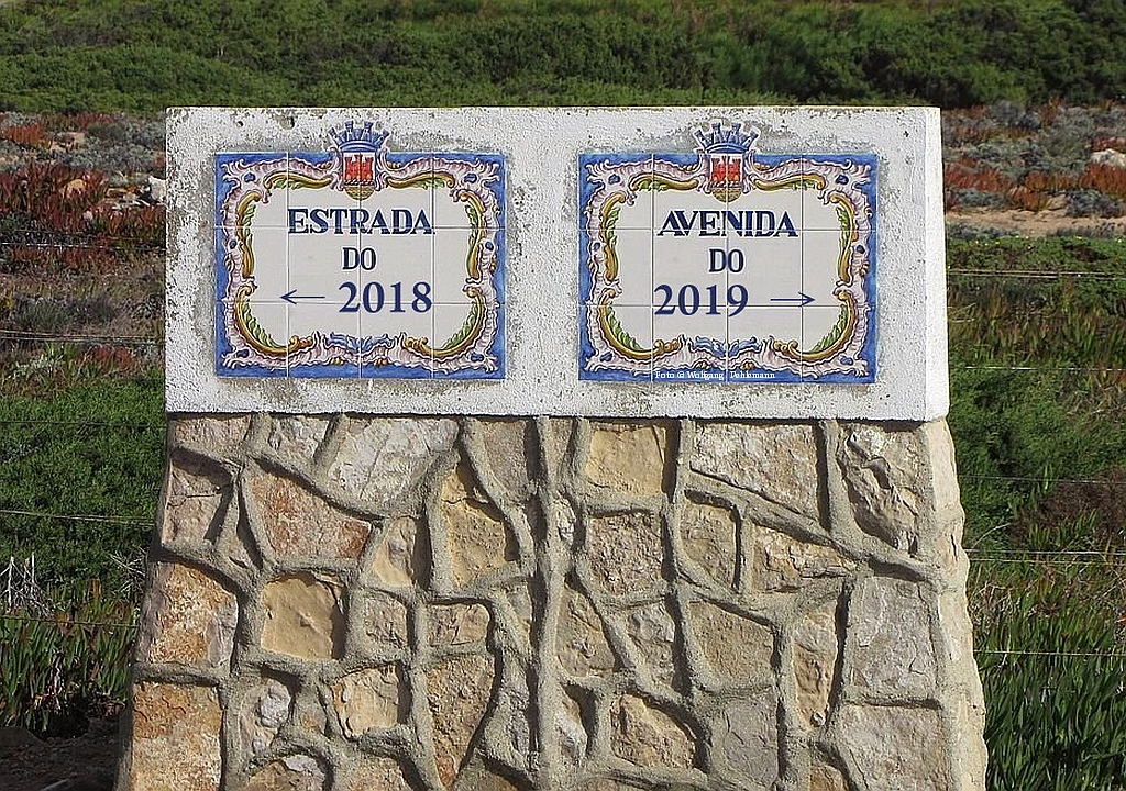 Wegweiser für die ewig Gestrigen, für alle Anderen die besten Wünsche auf dem Weg ins Neue Jahr